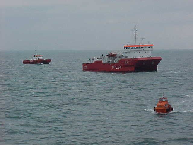 hier ziet men de drie beschreven loodsvaartuigen bij elkaar t.w. de Loodsboot rechts , op de voorgrond de z.g. Jol en links een snelle tender, de "Döse" of de "Duhnen". De hier afgebeelde loodsboten worden gebruikt in de monding van de Elbe , de vaarroute naar o.a. het Kielekanaal en Hamburg Eigen foto.